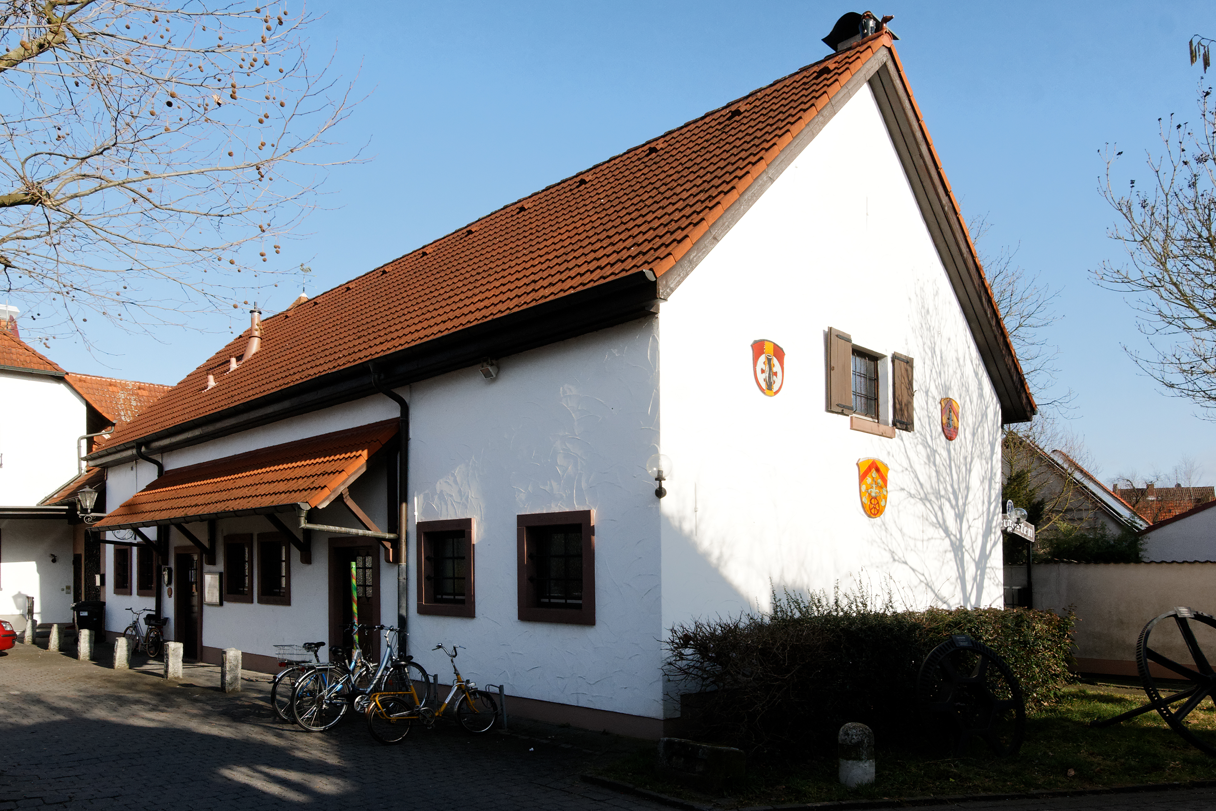 Töpfermuseum in Urberach, einem Stadtteil von Rödermark. Das Museum wurde 1984 eröffnet. Es befindet sich im Gebäude des ehemaligen Faselstalls, der 1906 erbaut wurde.